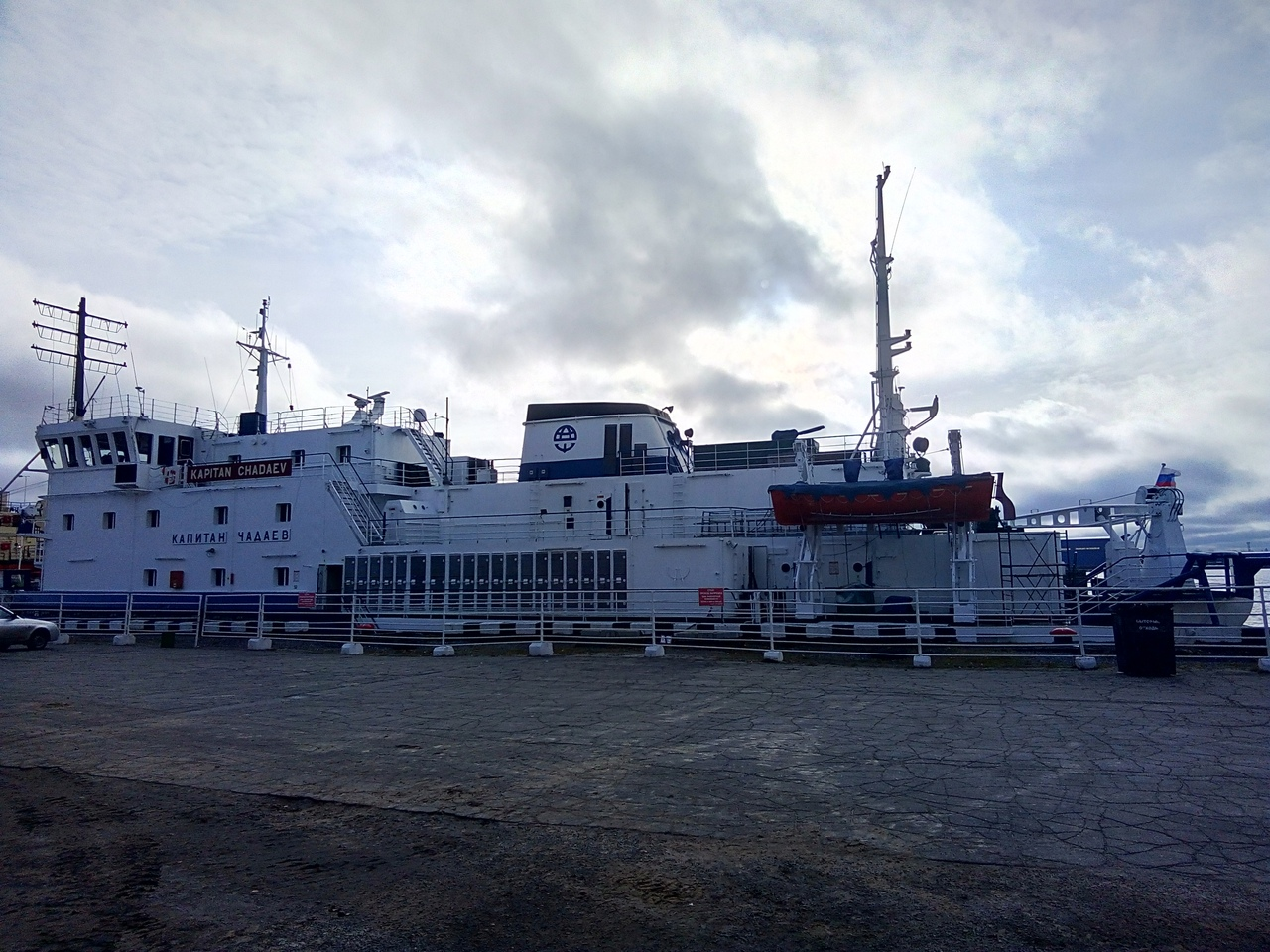 Ледокол «Капитан Чадаев» у причала в морском порту Архангельск осенью 2019 года